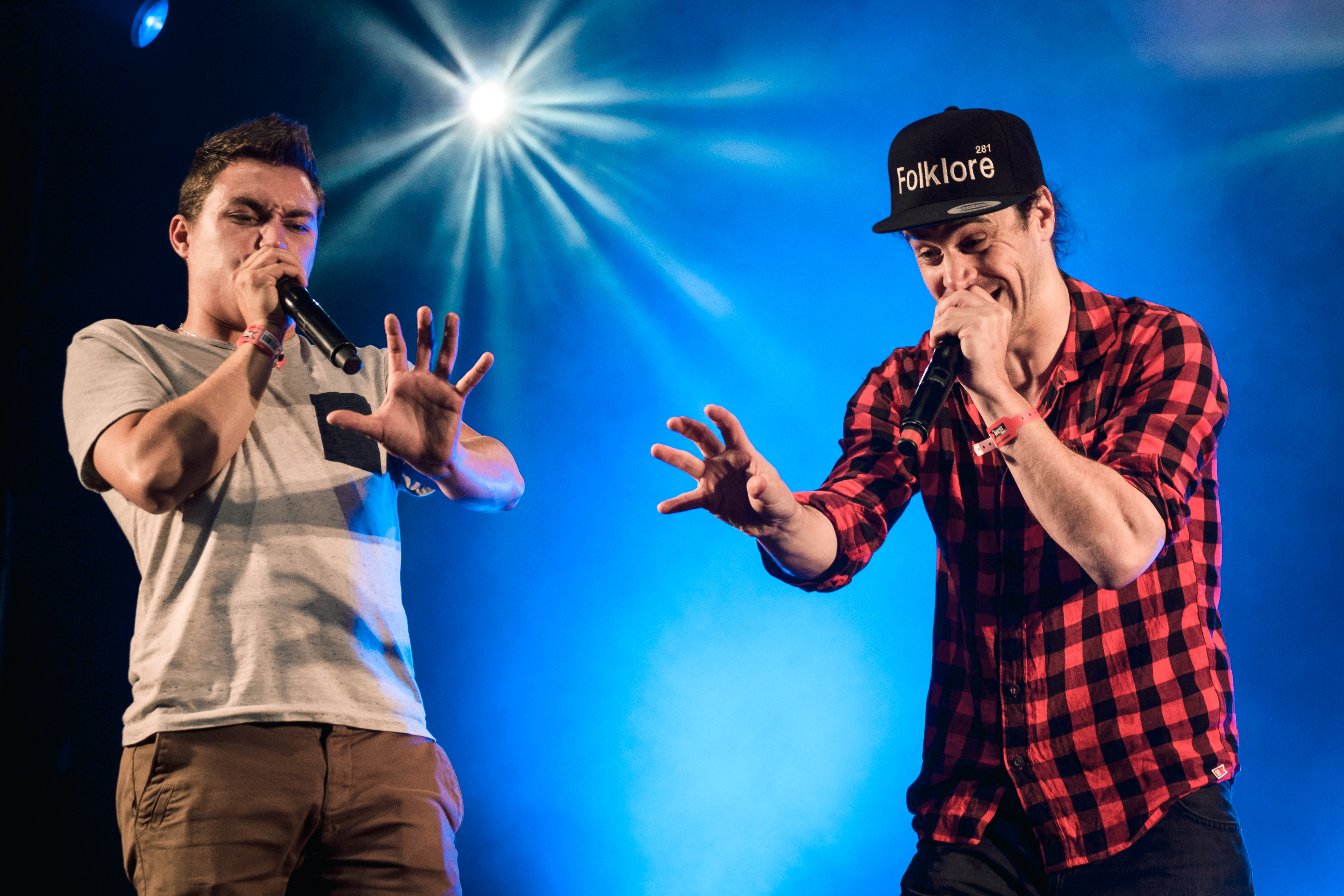 Krismenn & Alem en concert sur la grande scène des fêtes maritimes de Brest 2016.